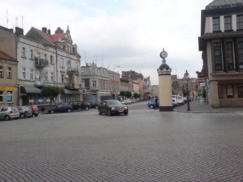 Rynek szamotulski